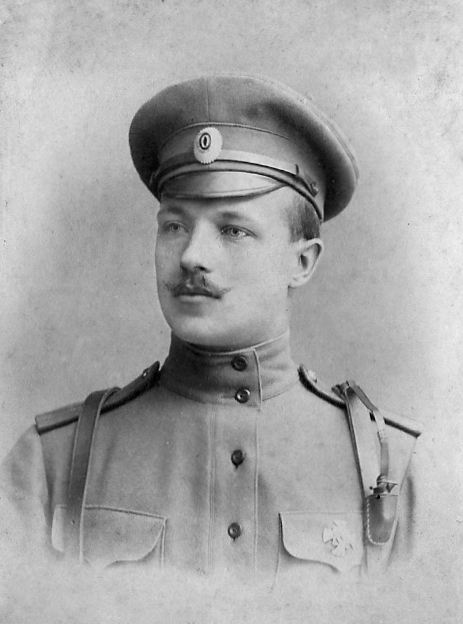 Герой Советского Союза Николай Андреевич Баранов в 1915 году.